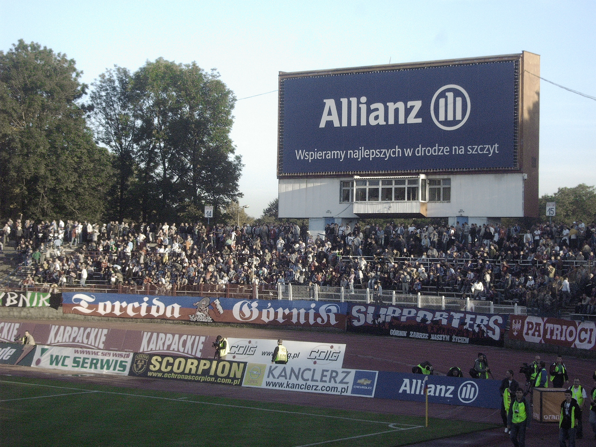 Górnik Zabrze Fans in stadium